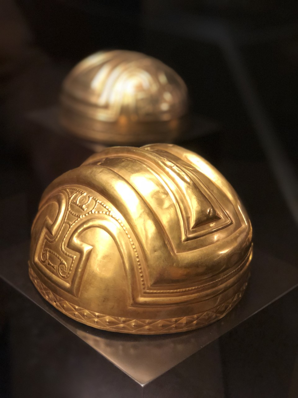 Tesoro Quimbaya Madrid